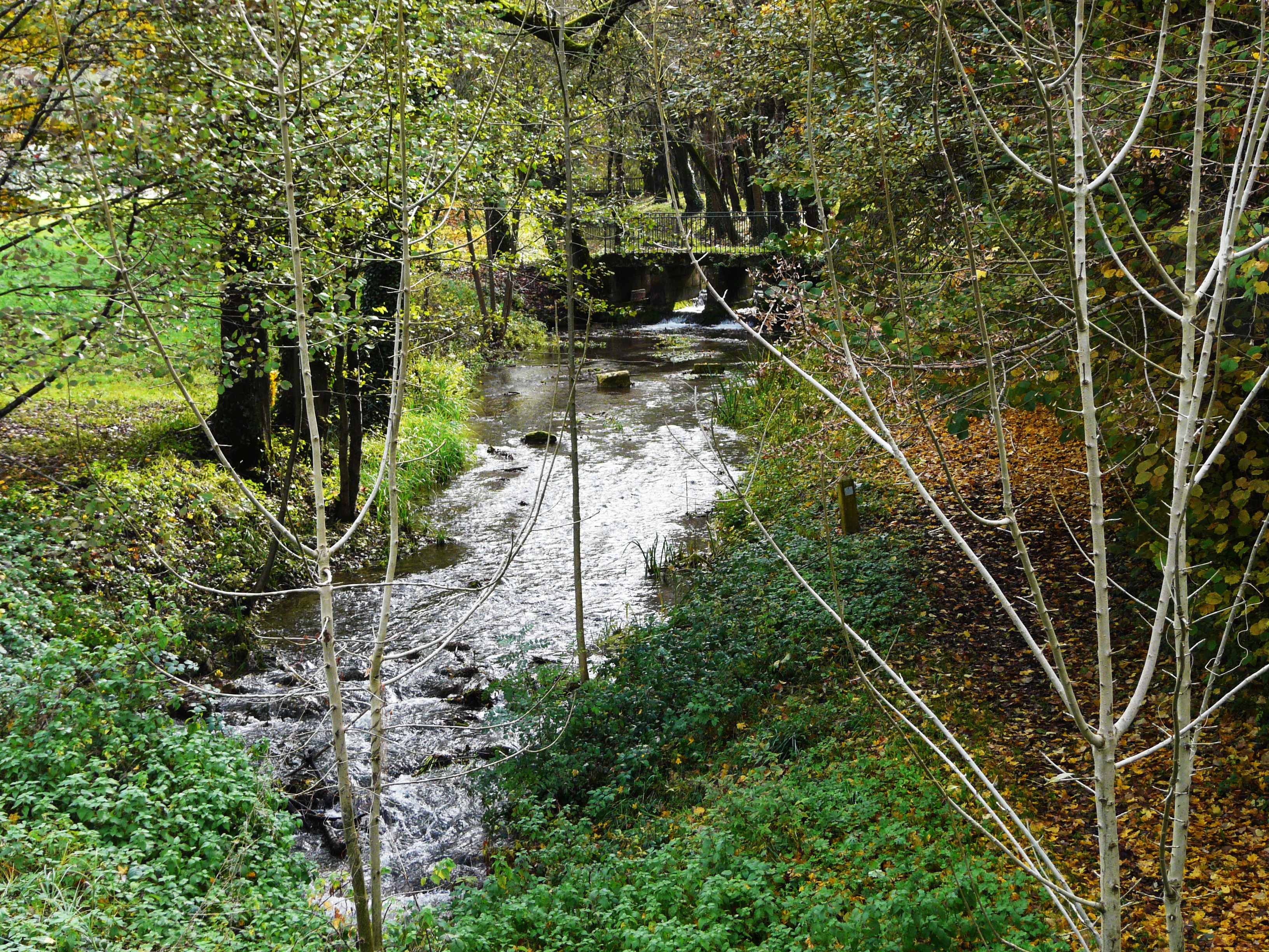 Ruisseau le Manoire en bordure du parc de la mairie, Saint-Laurent-sur-Manoire, Dordogne-France